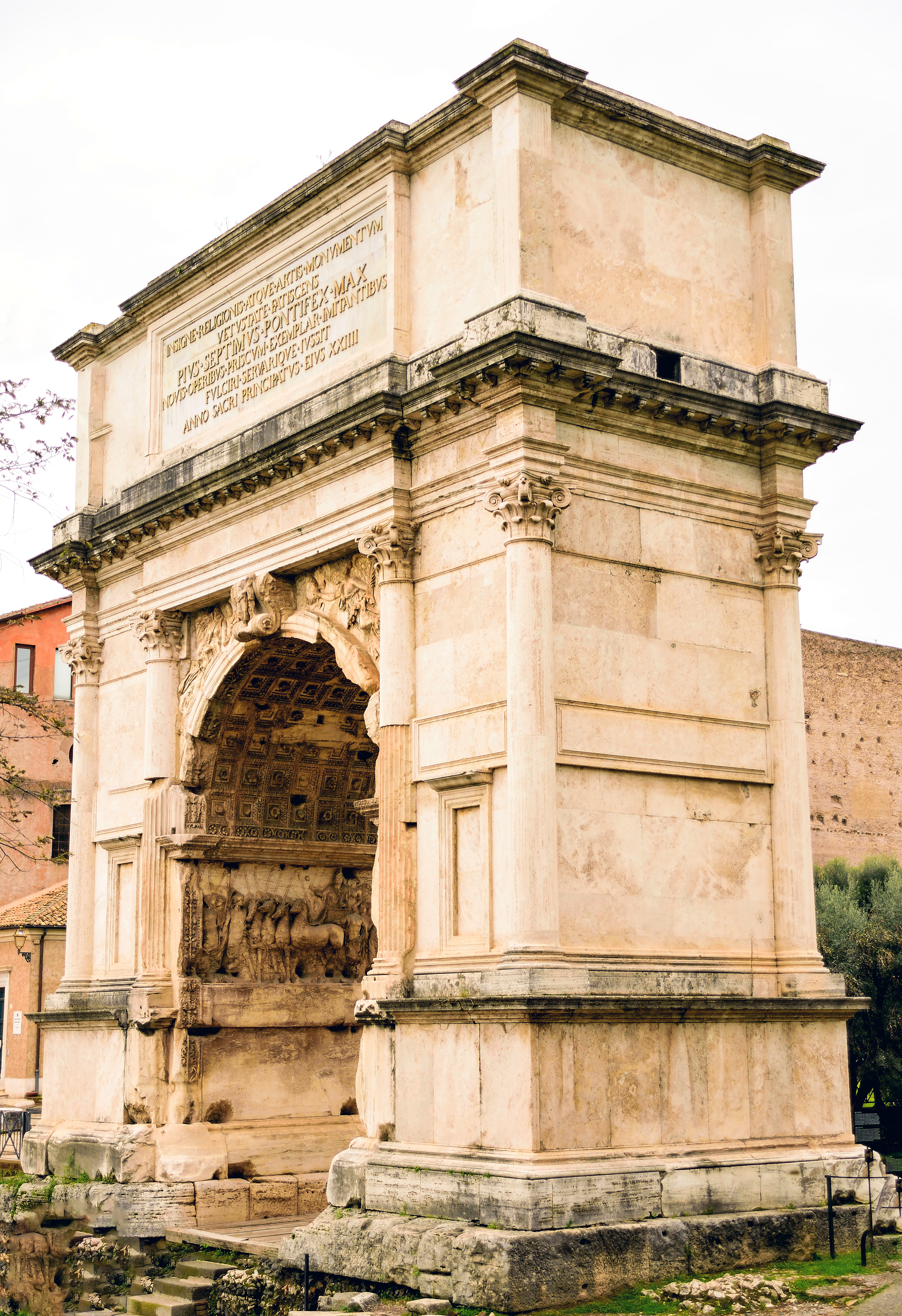 Der Titusbogen (Eingang zum Forum Romanum) von der Westseite